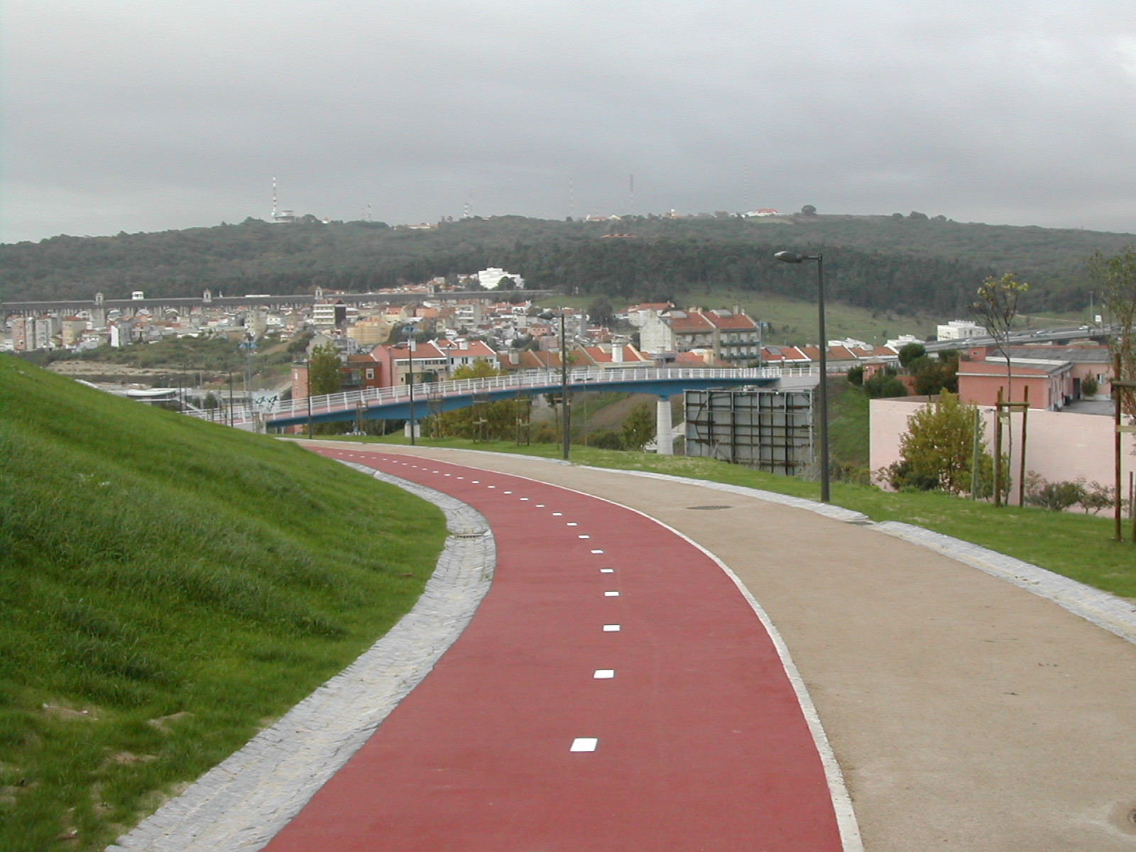 Corredor Verde que conduz do centro de Lisboa ao Parque Florestal de Monsanto. O viaduto pedonal transpõe a avenida Gulbenkian.